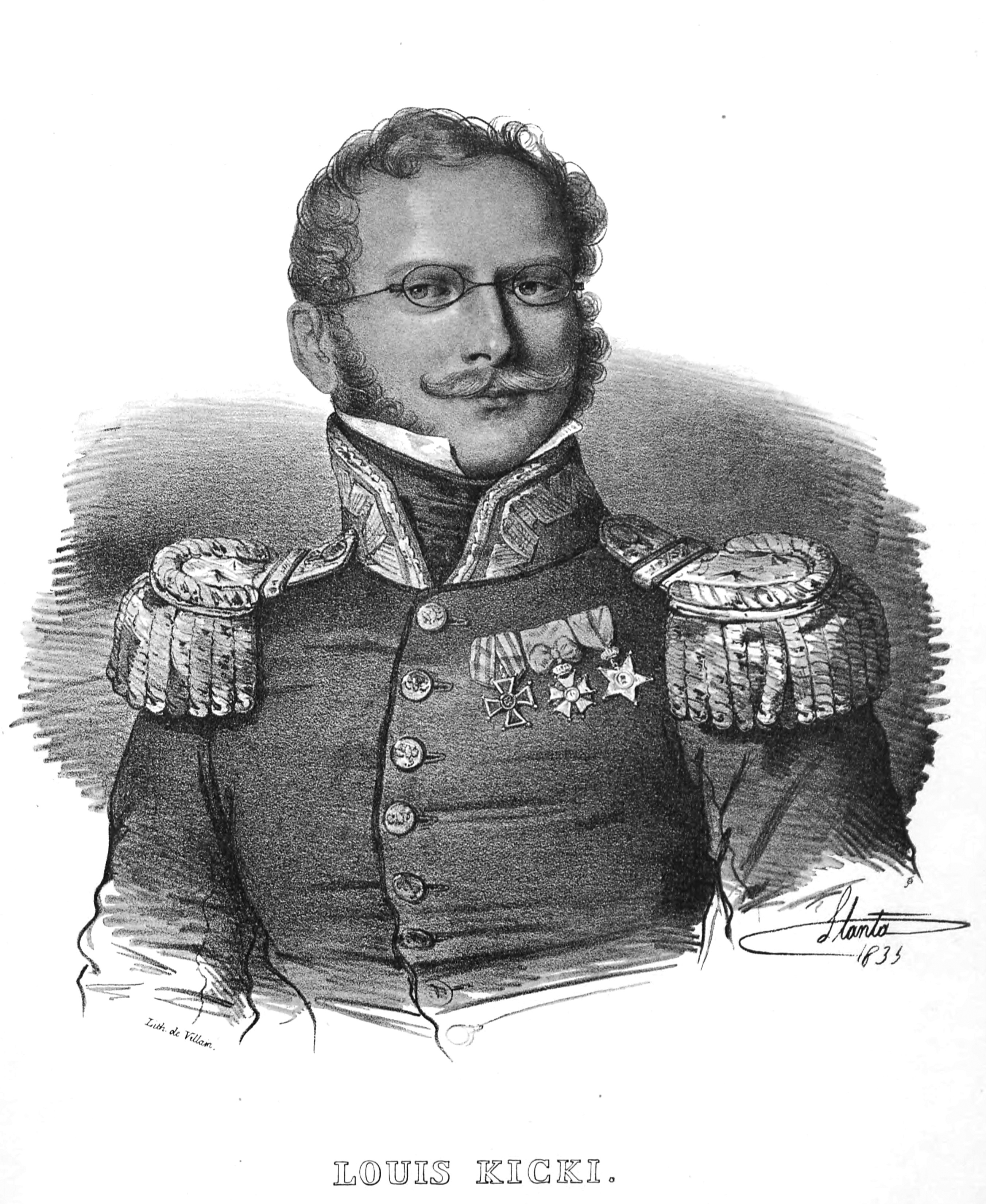 General Ludwik Kicki